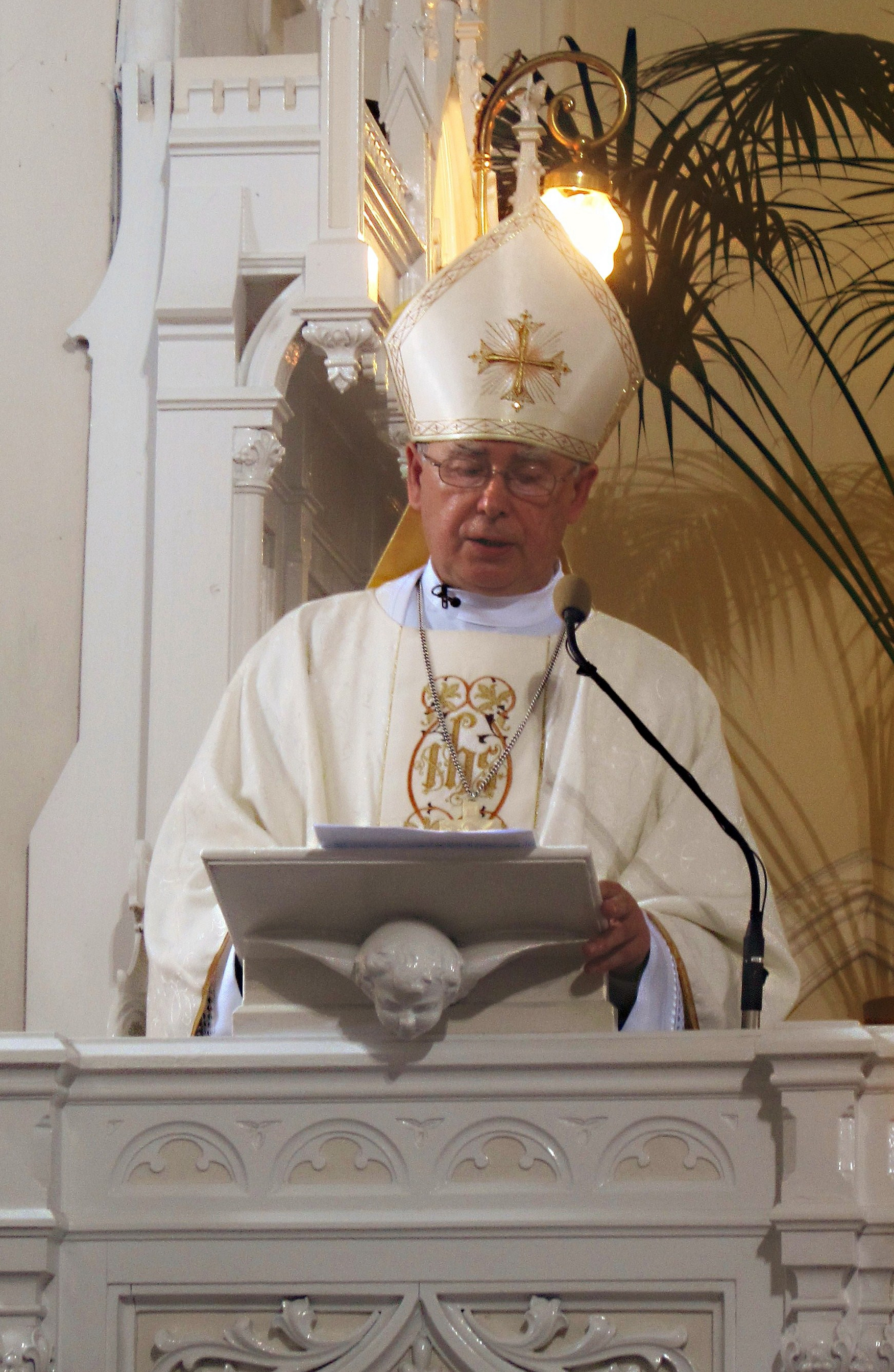 Ks.bp.Ludwik Maria Jabłoński podczas wygłaszania homilii w Świątyni Miłosierdzia i Miłości w Płocku 15-08-2012 r.